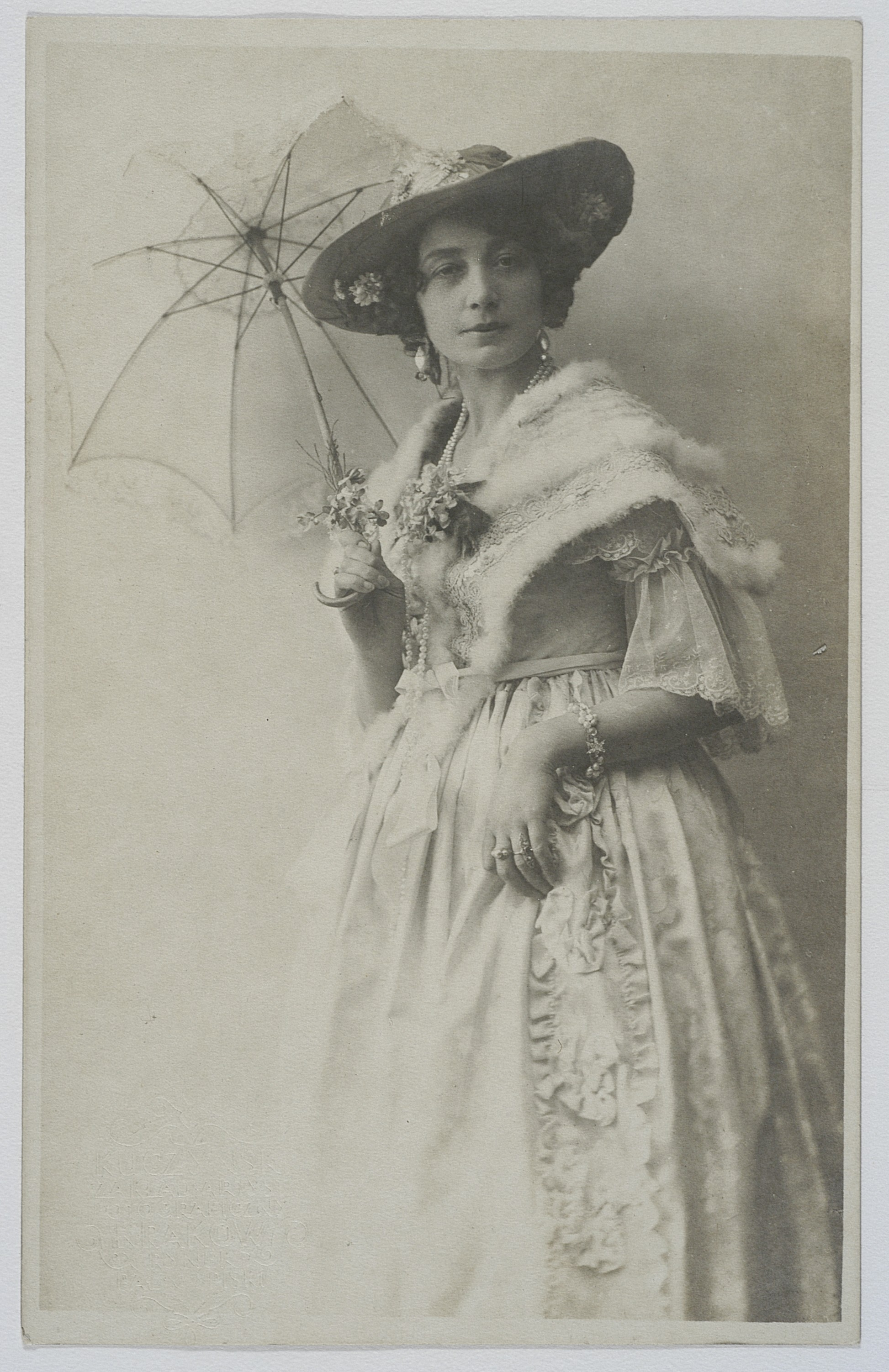 Antonina Klońska jako Arcyksiężna w spektaklu "Orlę" Edmunda Rostanda, Teatr im. Juliusza Słowackiego (Kraków), 1920-1921